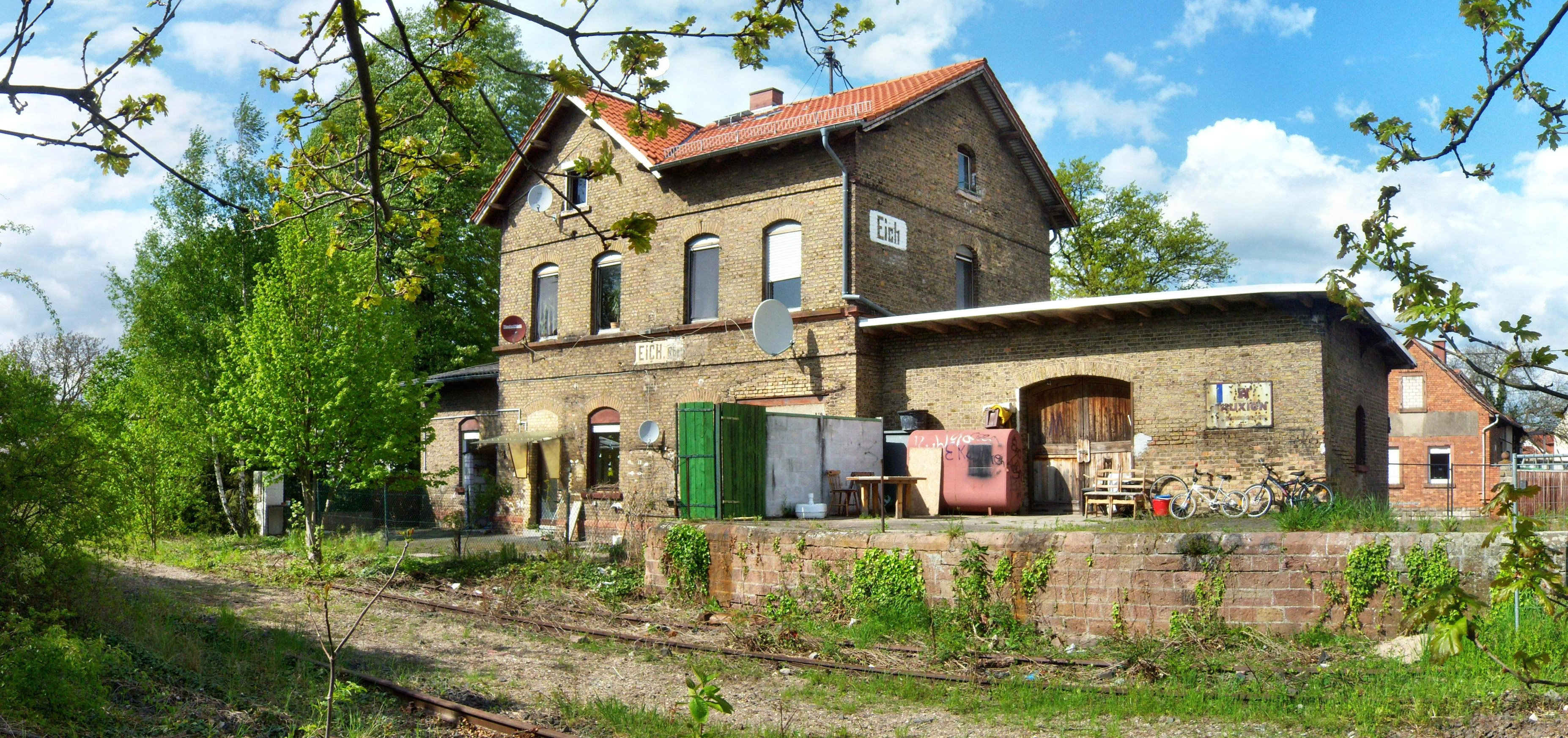 Der alte Eicher Bahnhof auf der Altrheinbahn